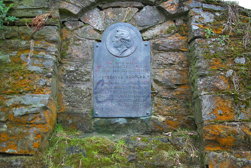 Tablica ku czci Chopina w stulecie rocznicy urodzin 1810-1910 park miejski Mickiewicza Sanok